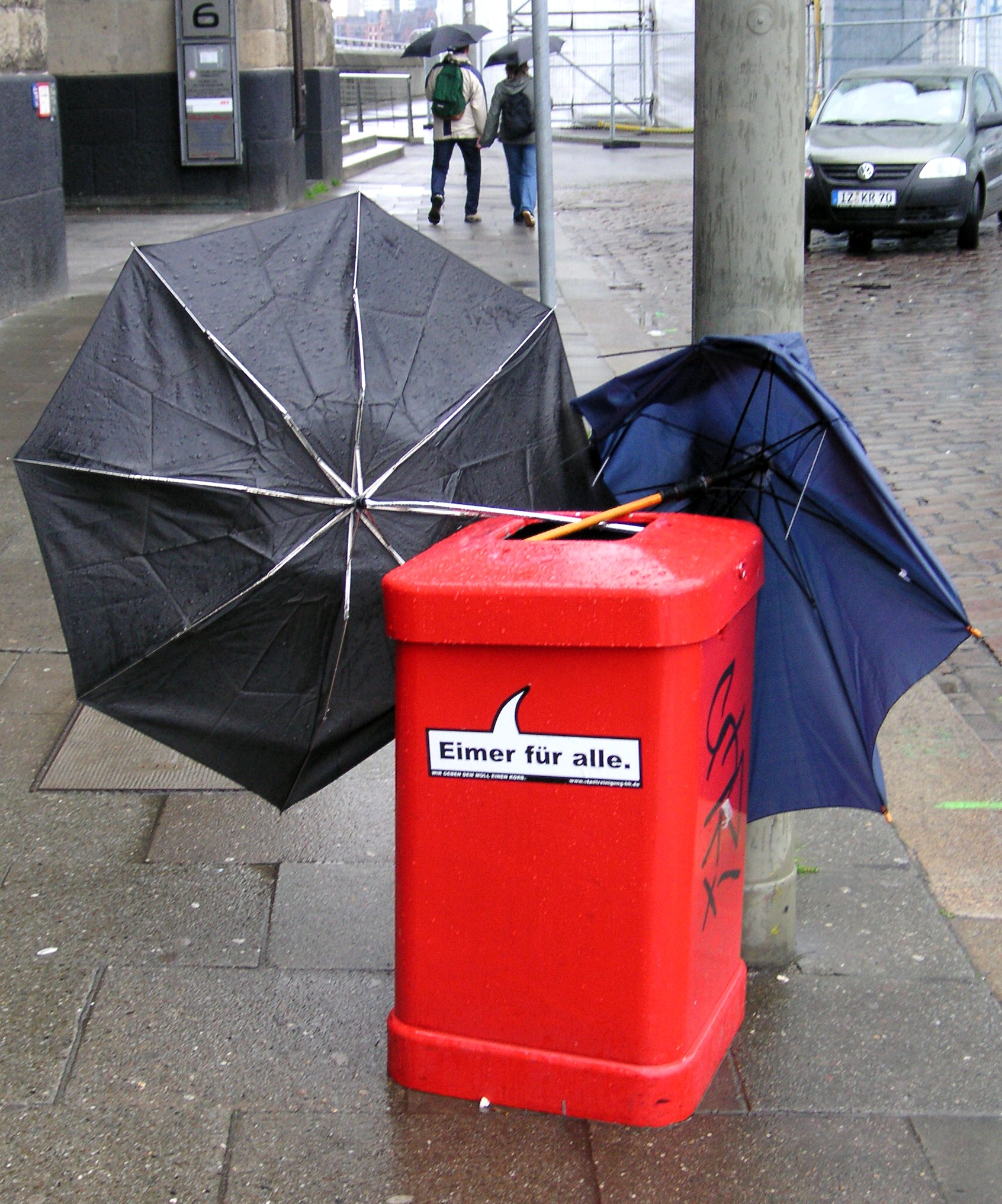 Öffentlicher Papierkorb in Hamburg bei "Schnuddelwetter"